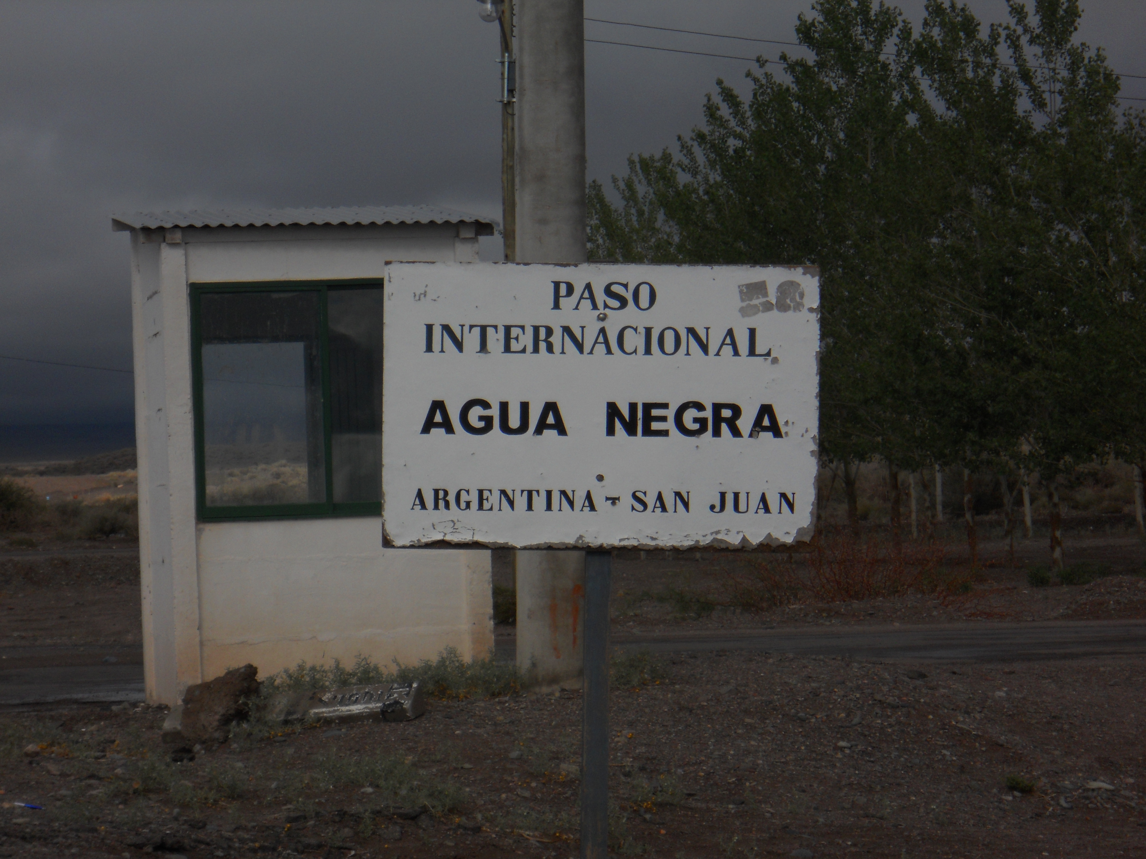 Paso Internacional Aguas Negras. Cartel en el limite de la Provincia de San Juan.